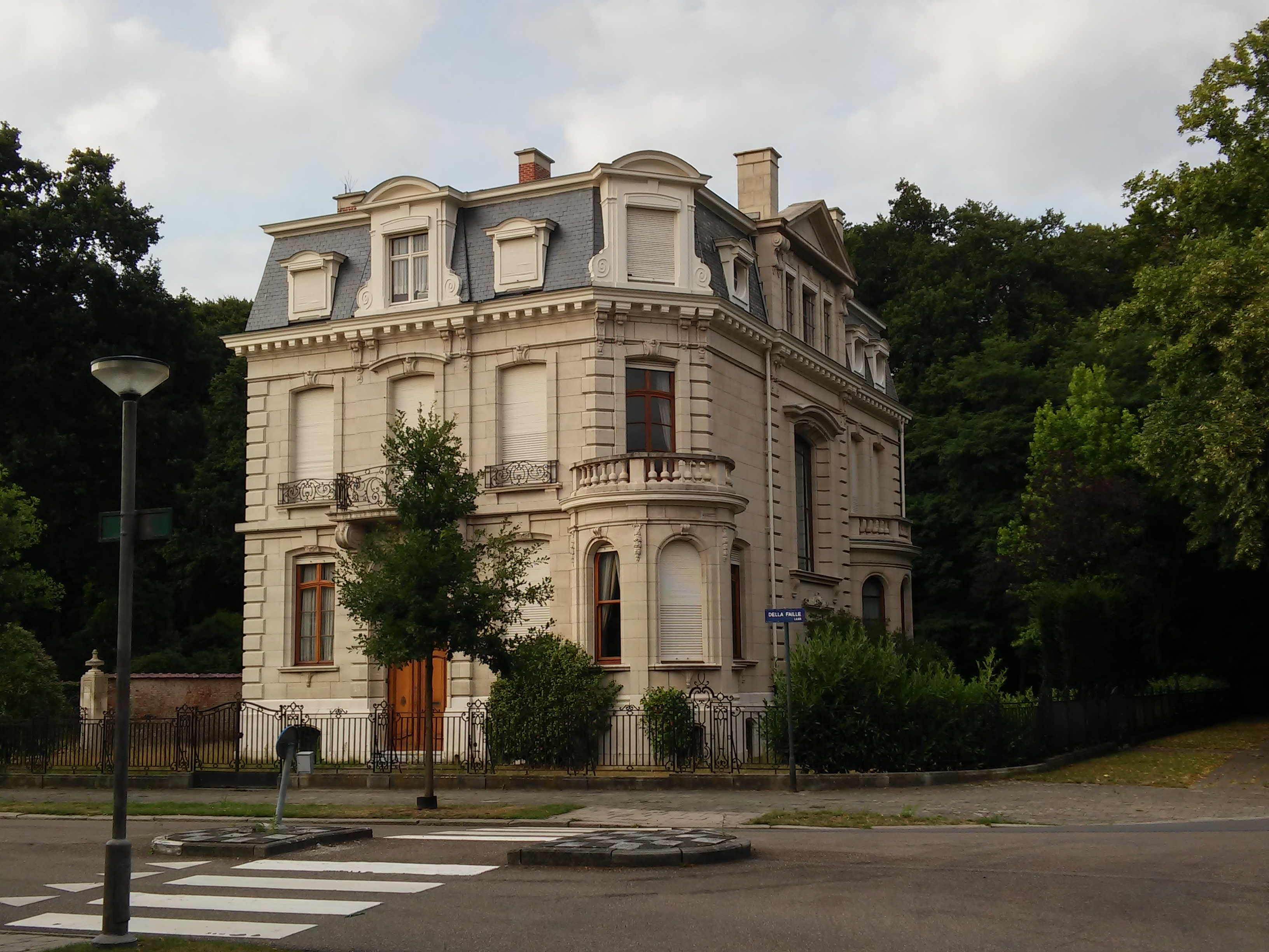 Landhuis, Della Faillelaan 23, Antwerpen